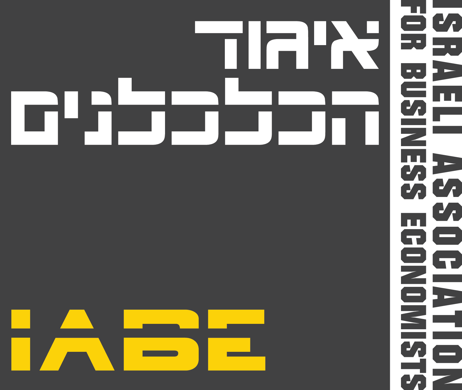 לוגו איגוד הכלכלנים